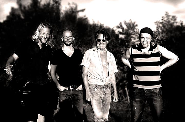 Revolutionsorkestern 2011